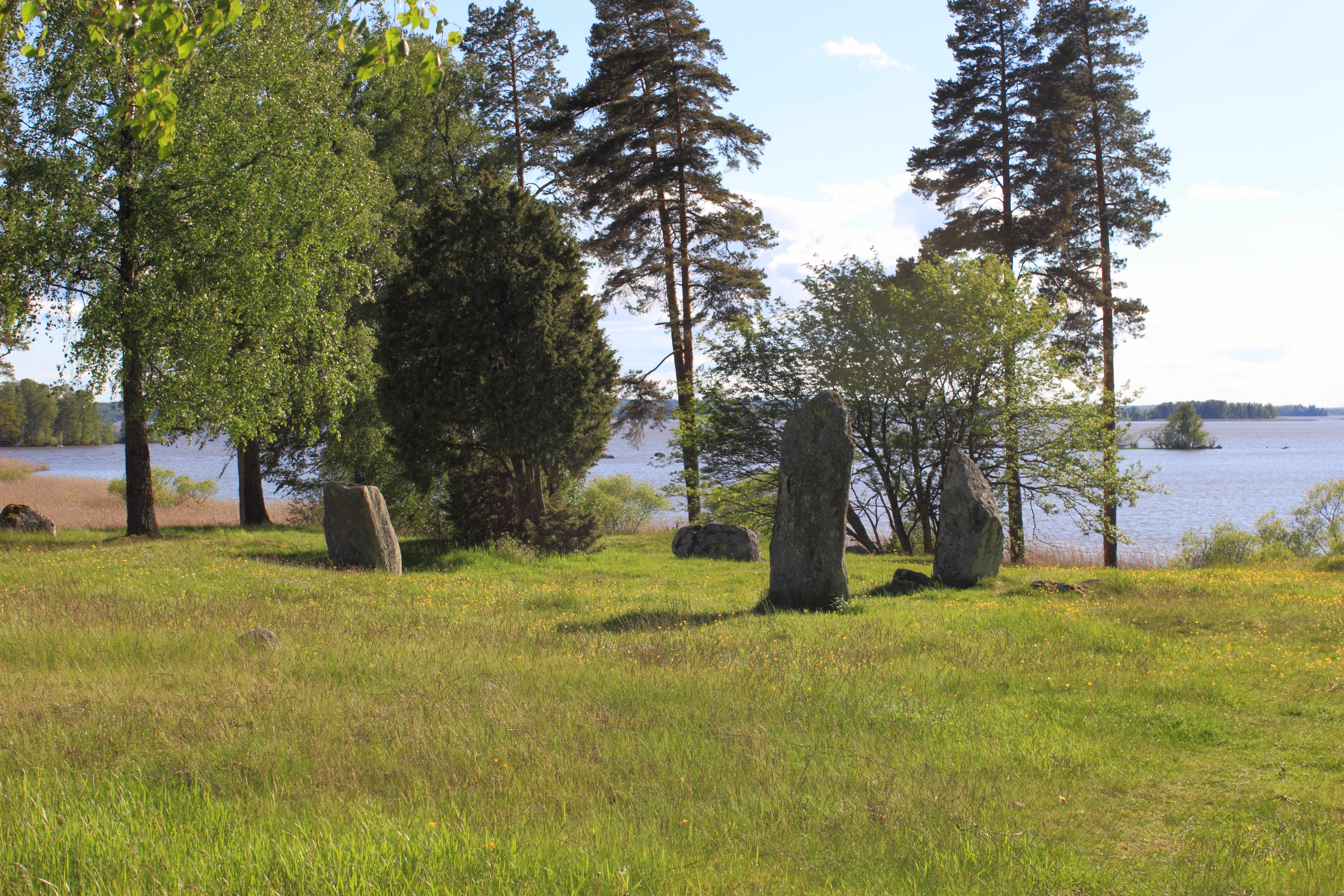 Skävesunds gravfält, Glanshammars socken